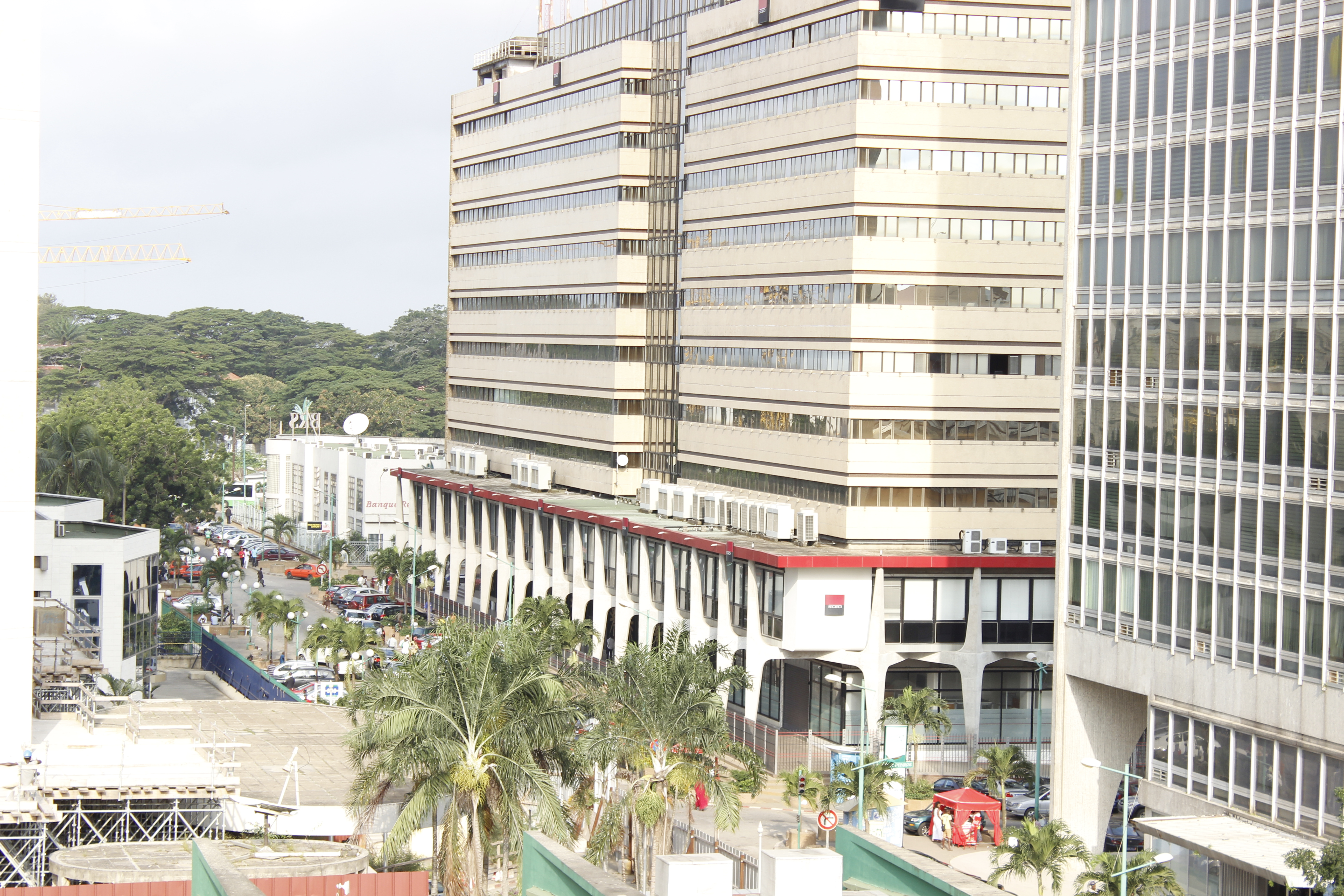 vue en hauteur du centre des affaires de la capitale économique de la Côte d'Ivoire.